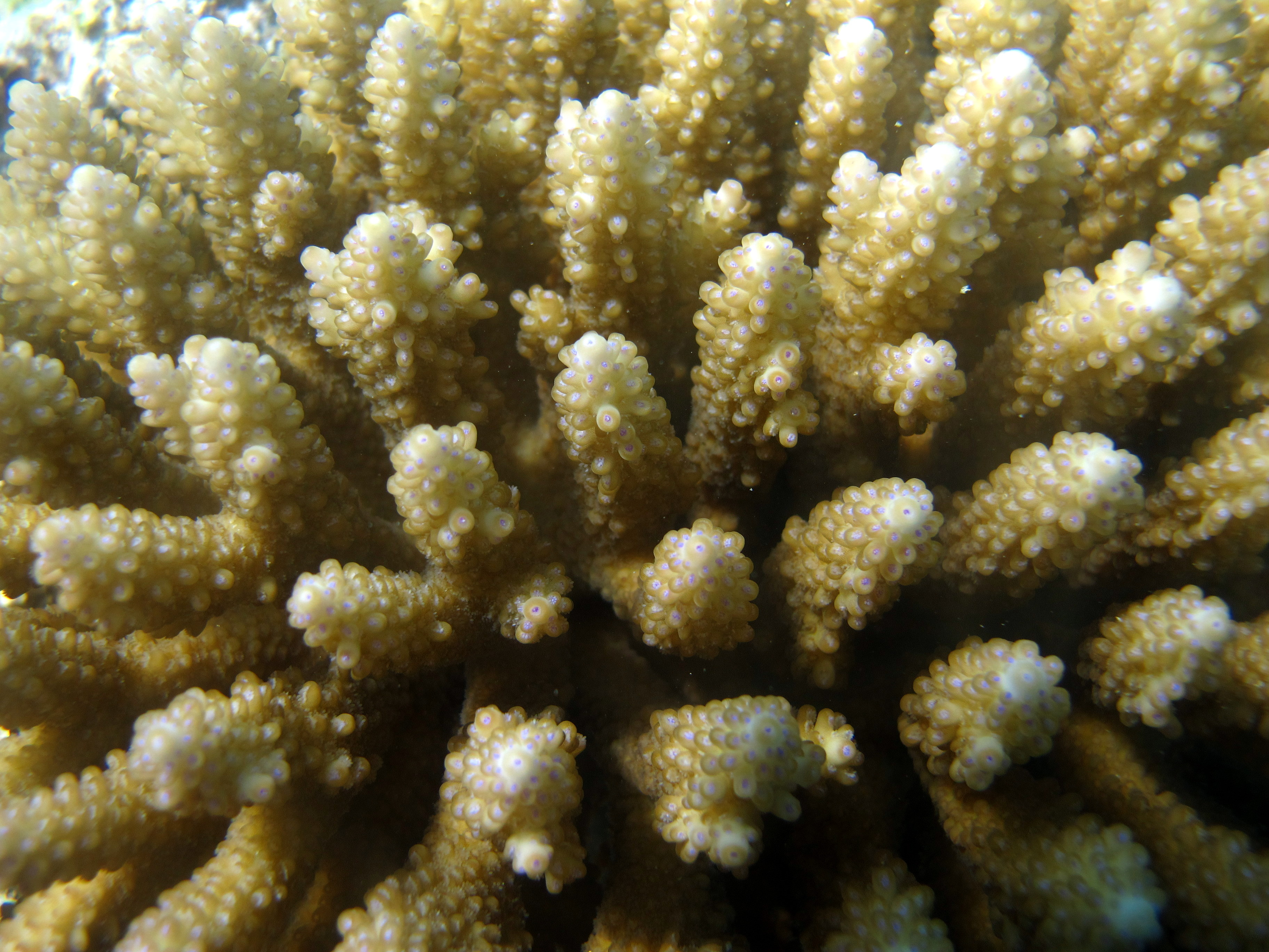 Gros plan sur une colonie de corail Acropora verwei aux Maldives (atoll de Baa).